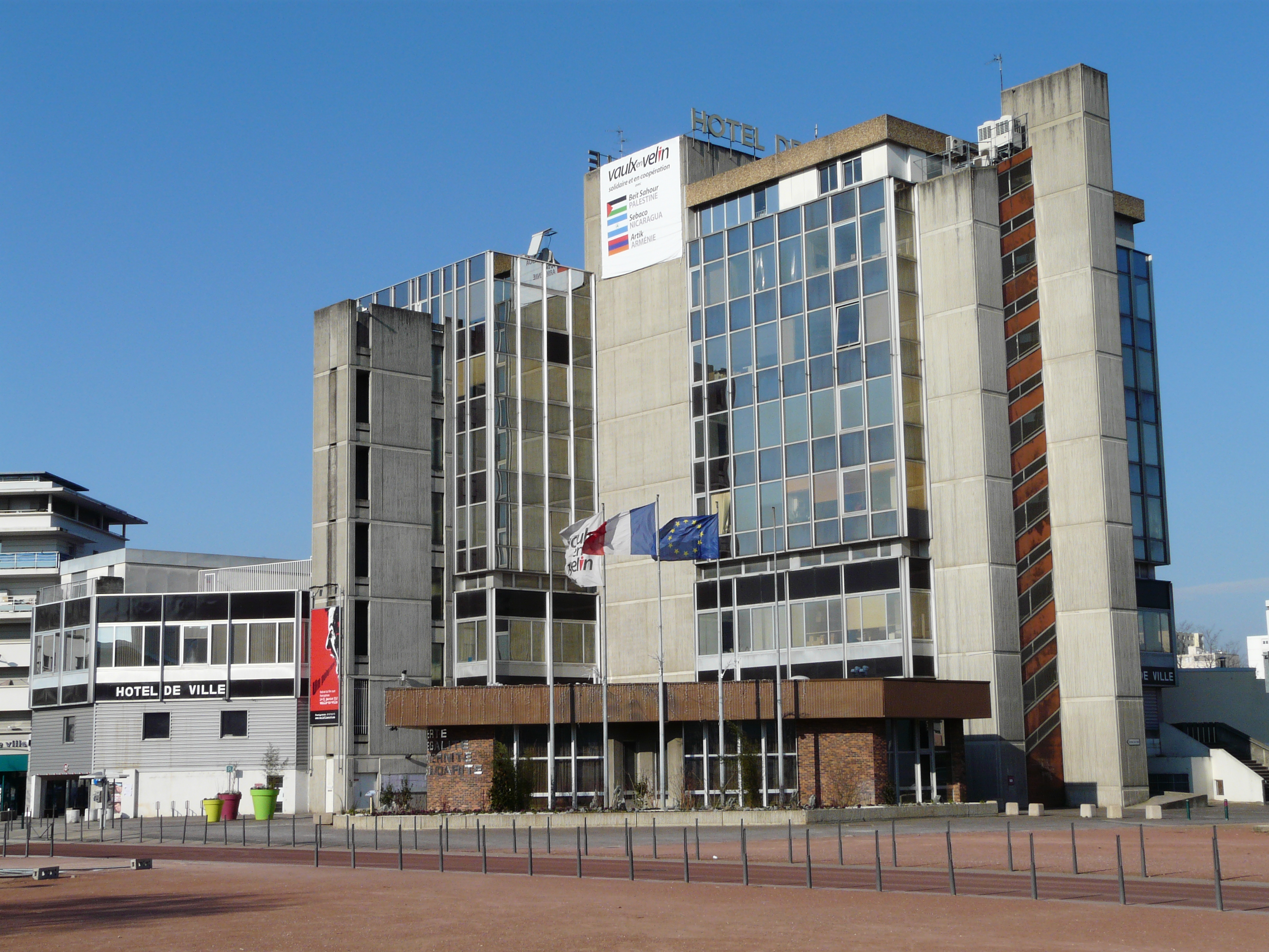 L'hôtel de Ville de Vaulx-en-Velin